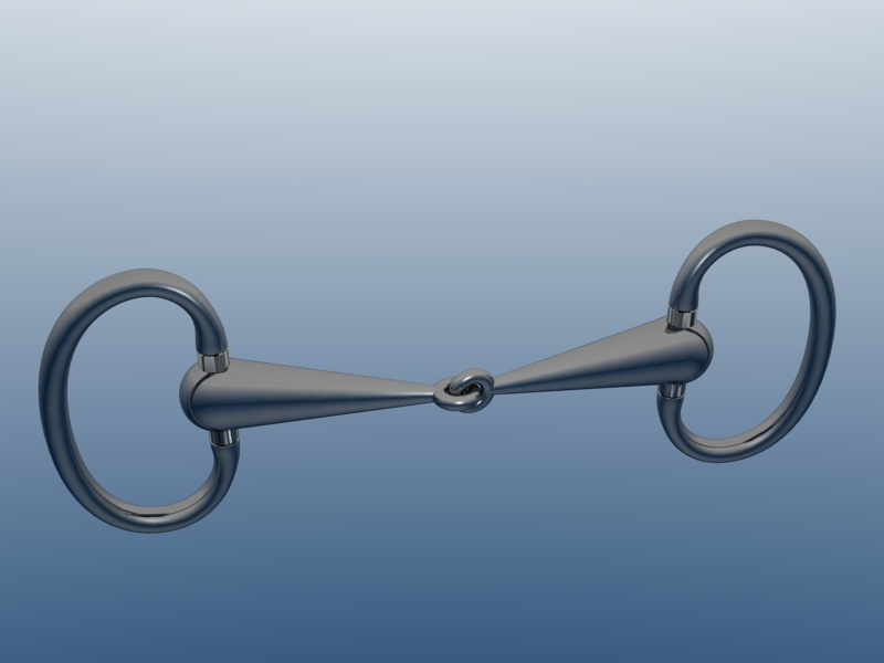 a snuffle bit with oval bit ring. Un mors à anneaux ovales, dit "mors olive". Les anneaux n'ont qu'un seul degré de liberté. Modélisé sous Blender par LardonCru.